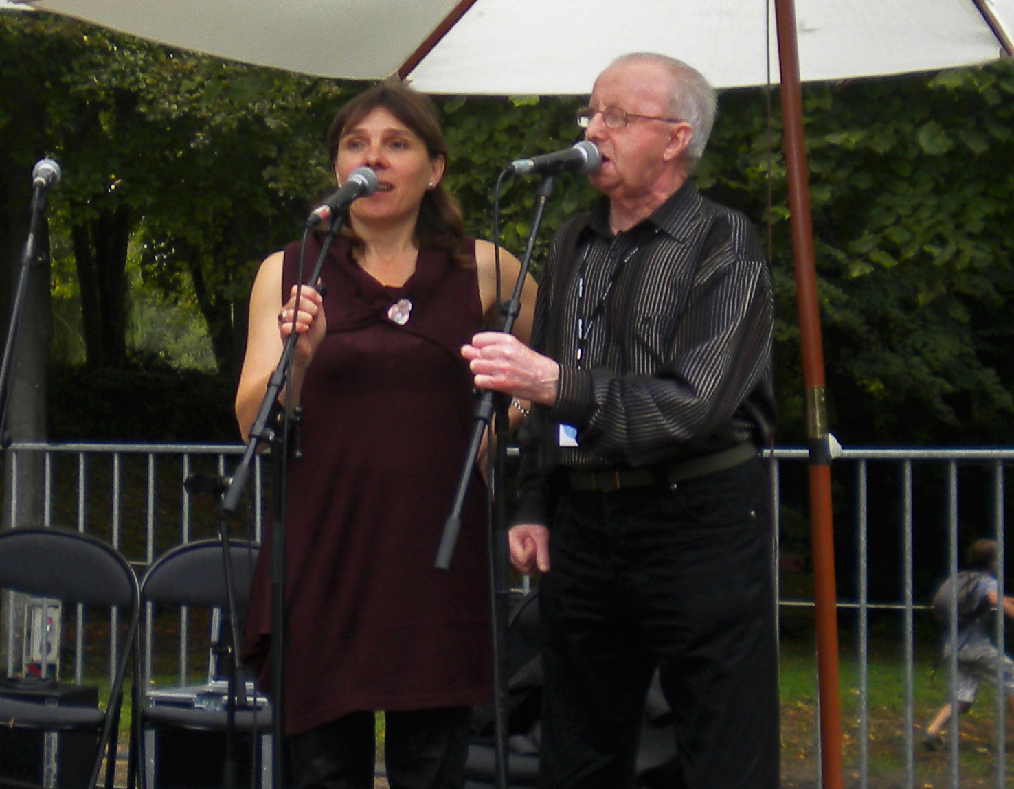 Annie Ebrel ha Marsel Gwilhoù e fest-deiz Villarceaux (Val d'Oise, Frañs)